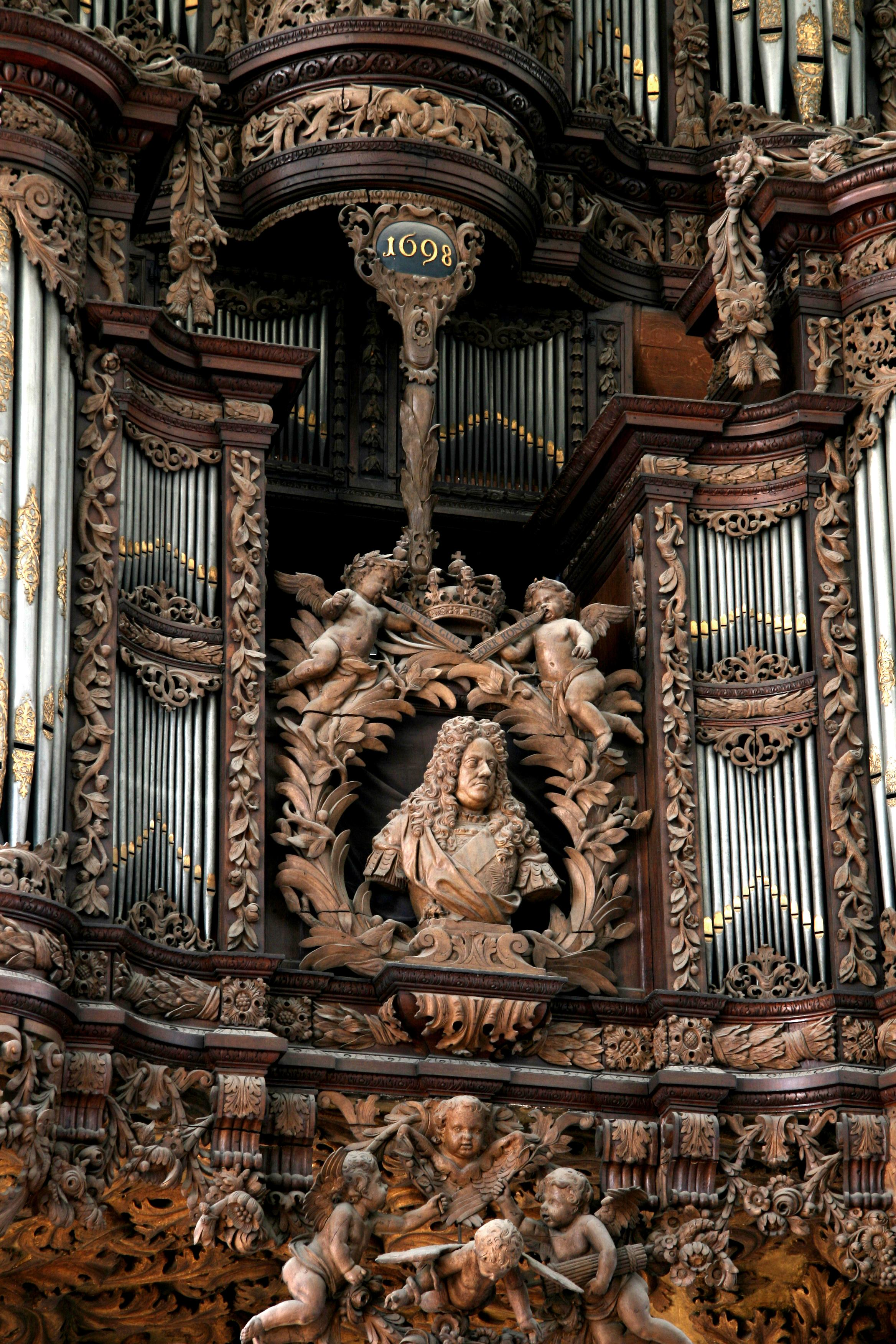 Vor Frelser Kirke (Church of Our Saviour), Copenhagen, Denmark. Organ front. Detail.